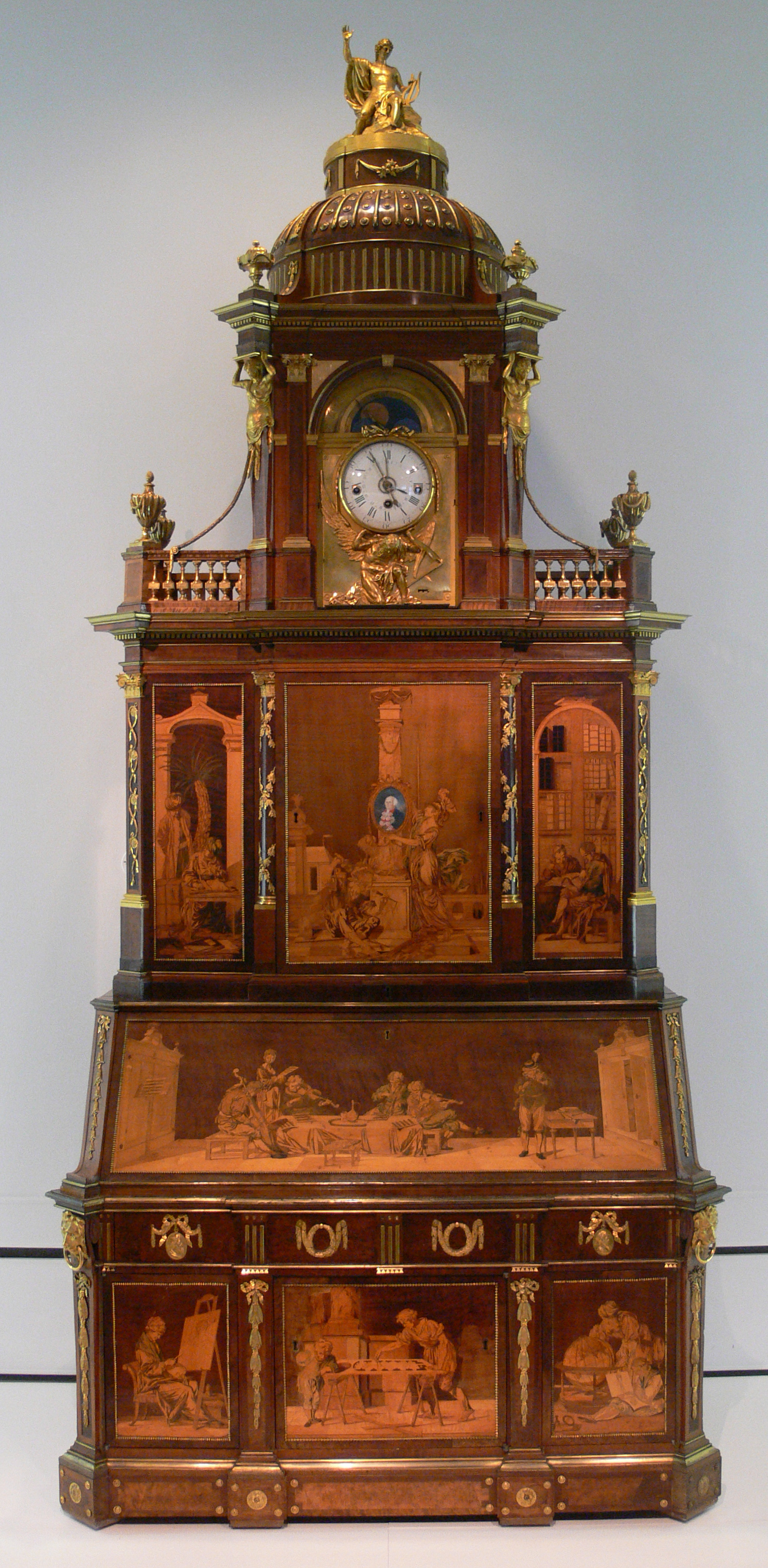 Pultschreibschrank („Neuwieder Kabinett“), aus der Werkstatt David Roentgen und Peter Kinzing, Neuwied 1779 (Höhe 359 cm) Kunstgewerbemuseum Berlin, Inv. Nr. O-1962,24